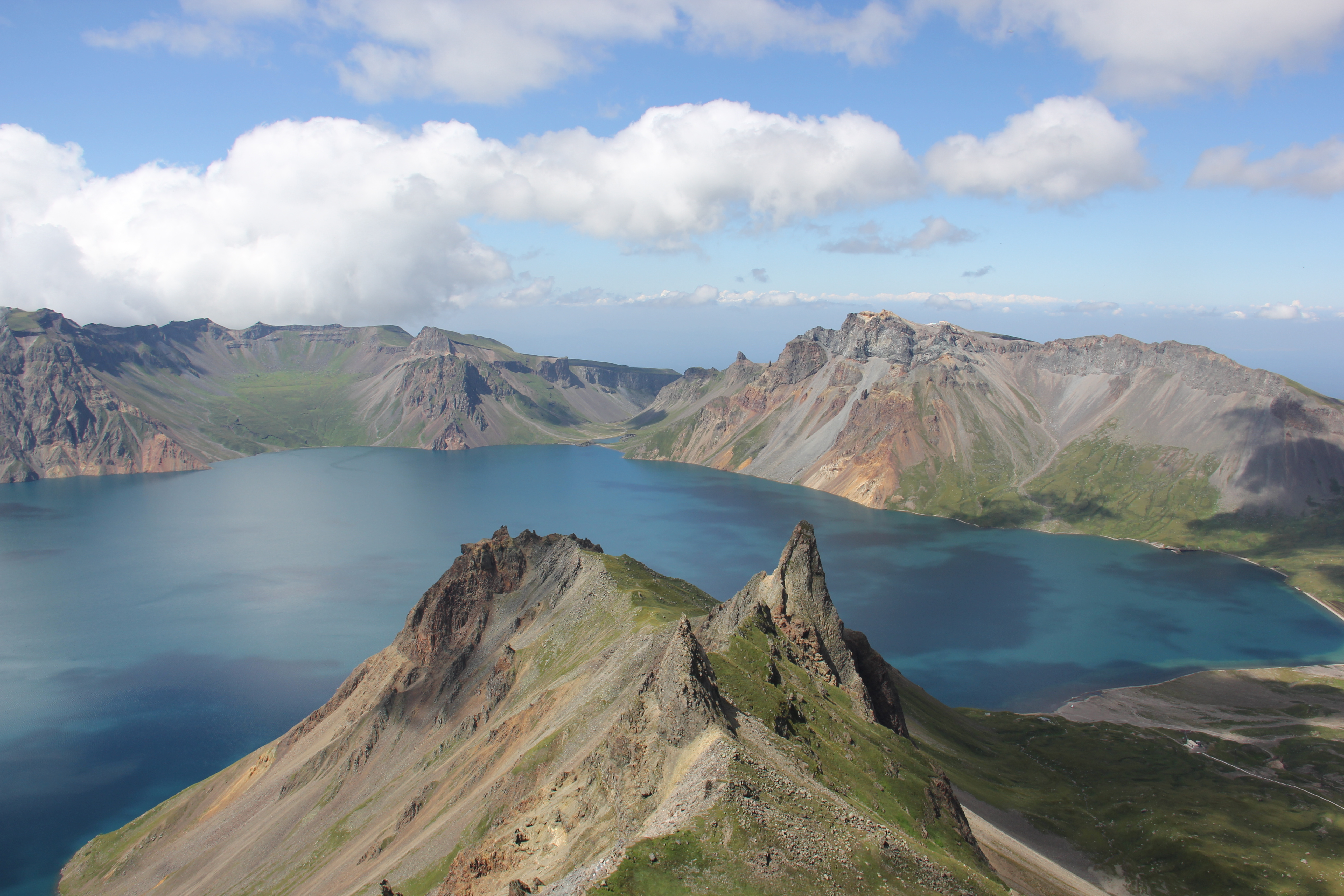 Mt. Paekdu